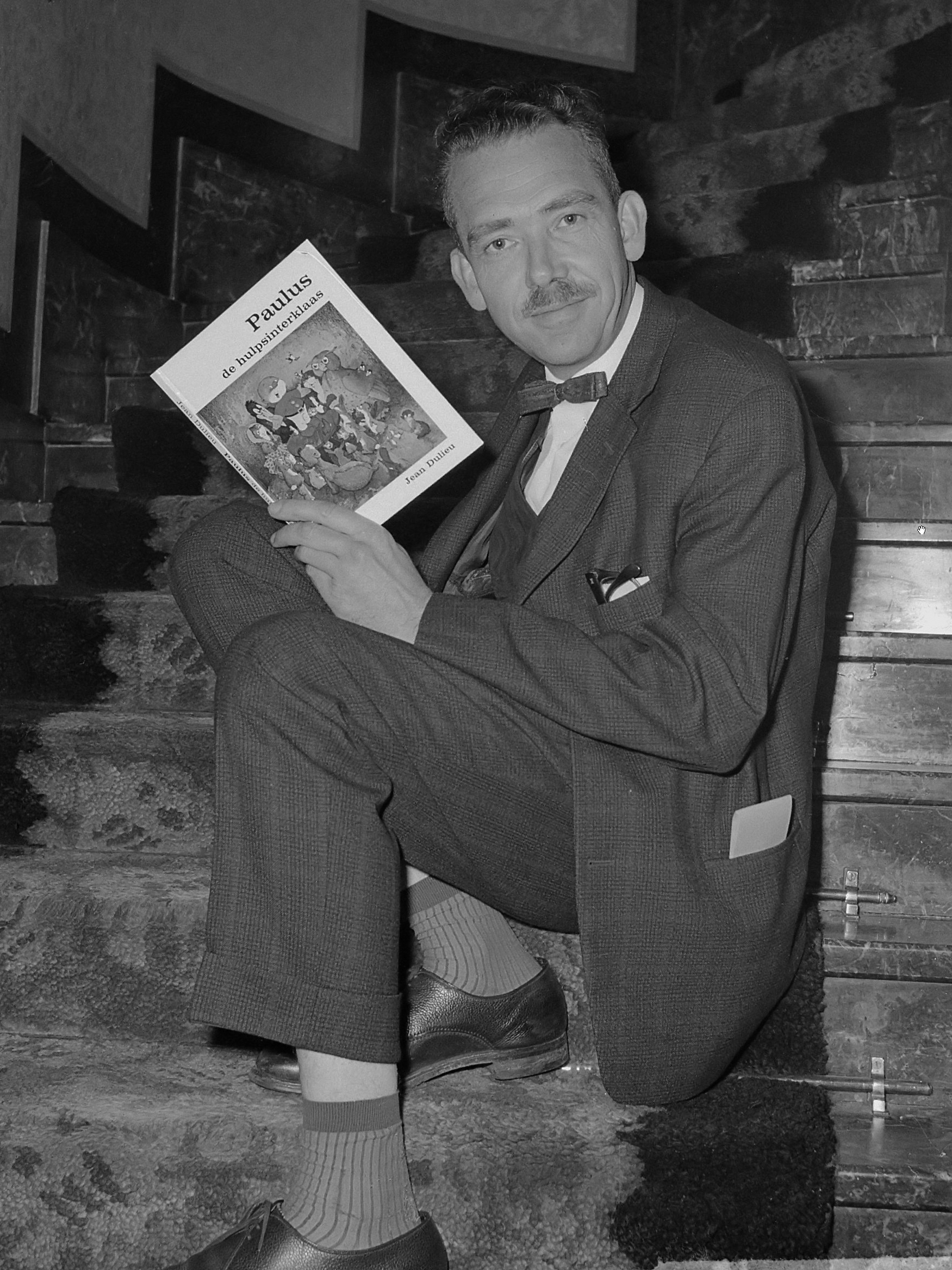 Kinderboek 1962, Paulus de Hulpsinterklaas van Jean Dulieu 24 oktober 1962